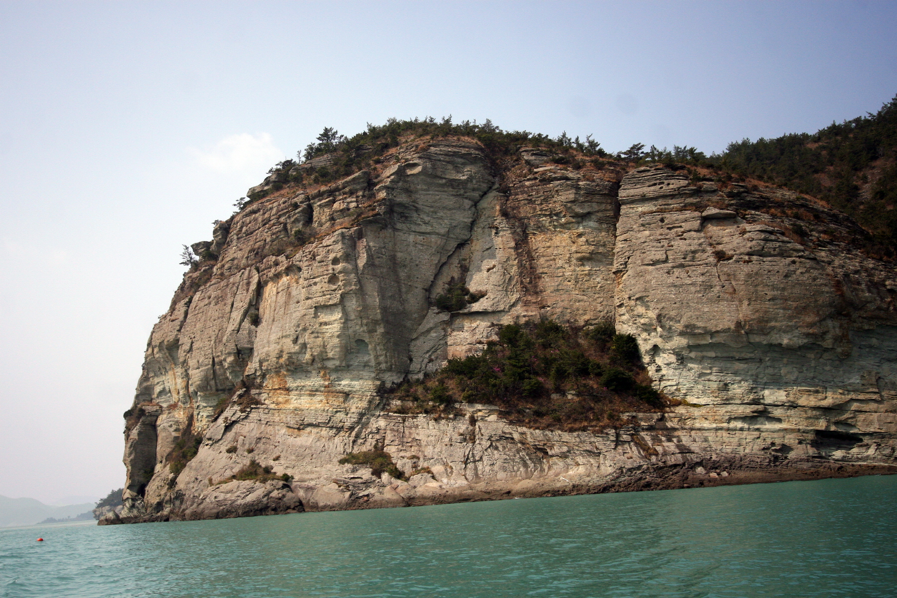 완도 금당8경중 하나인 금당적벽. 중국의 적벽처럼 절벽의 경관이 수려하다하여 붙여진 이름이다.